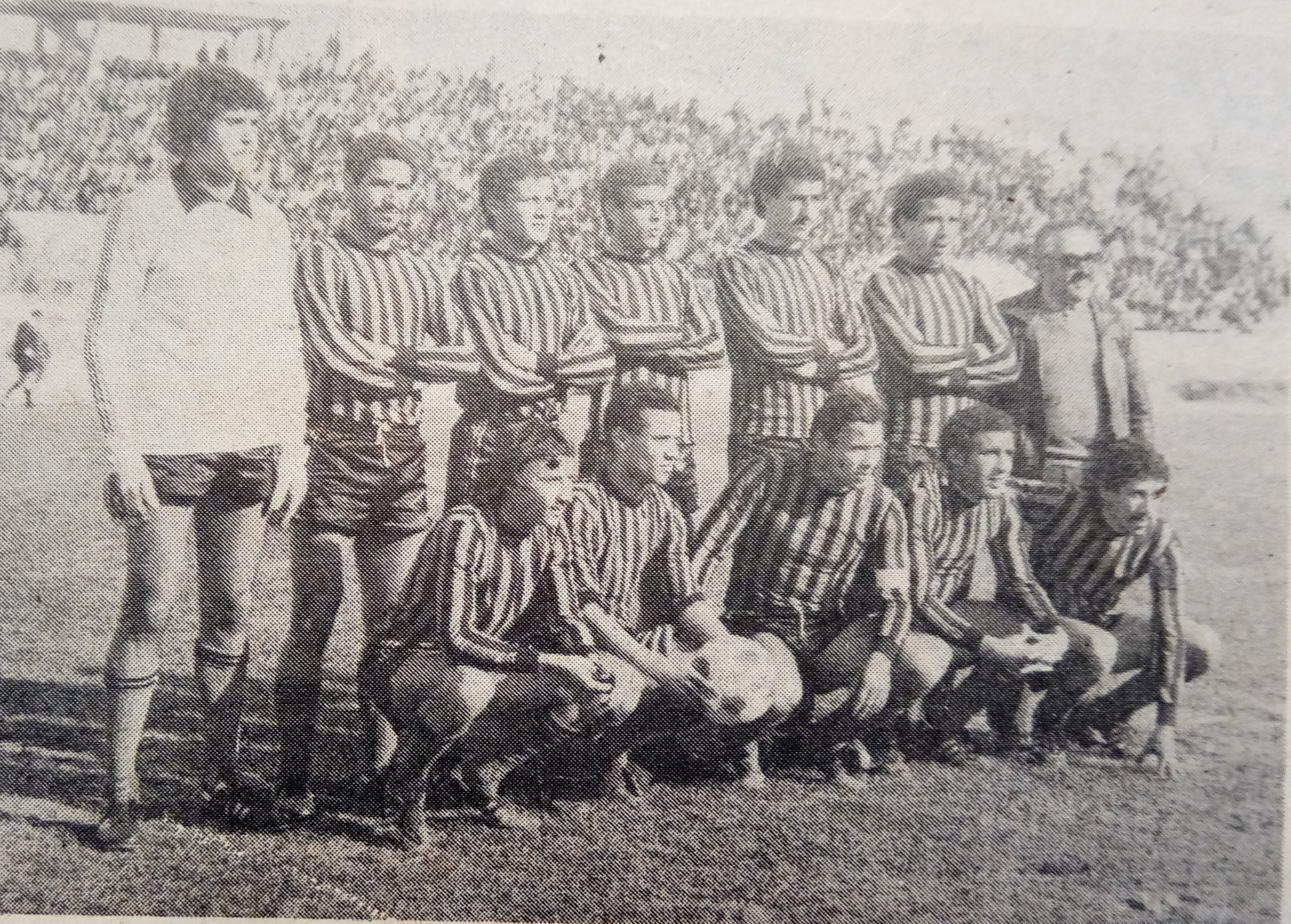 Assabah 1980